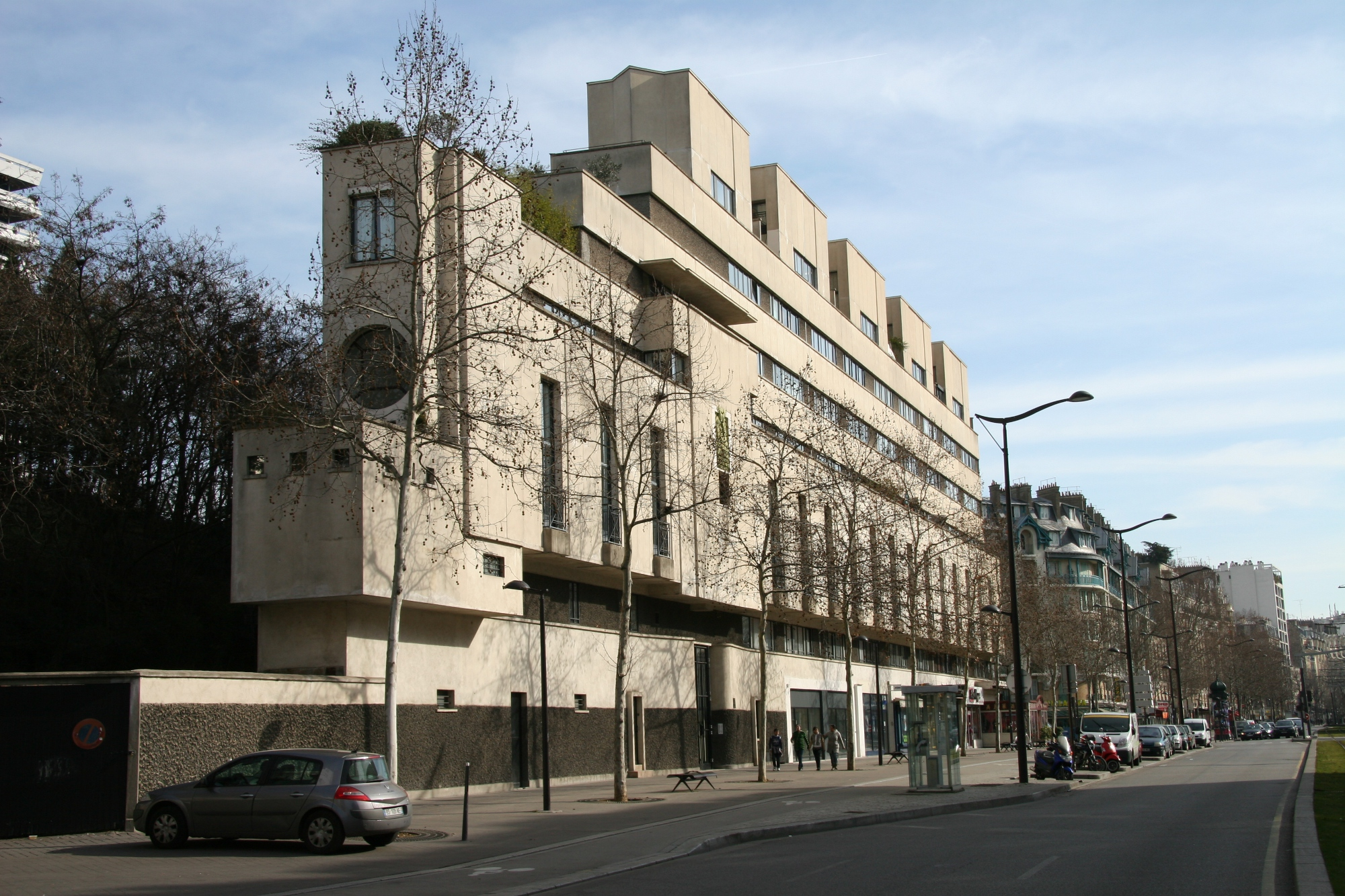 Inscrit au monuments historique sous la référence PA00086654